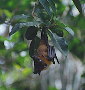 Vliegende vos